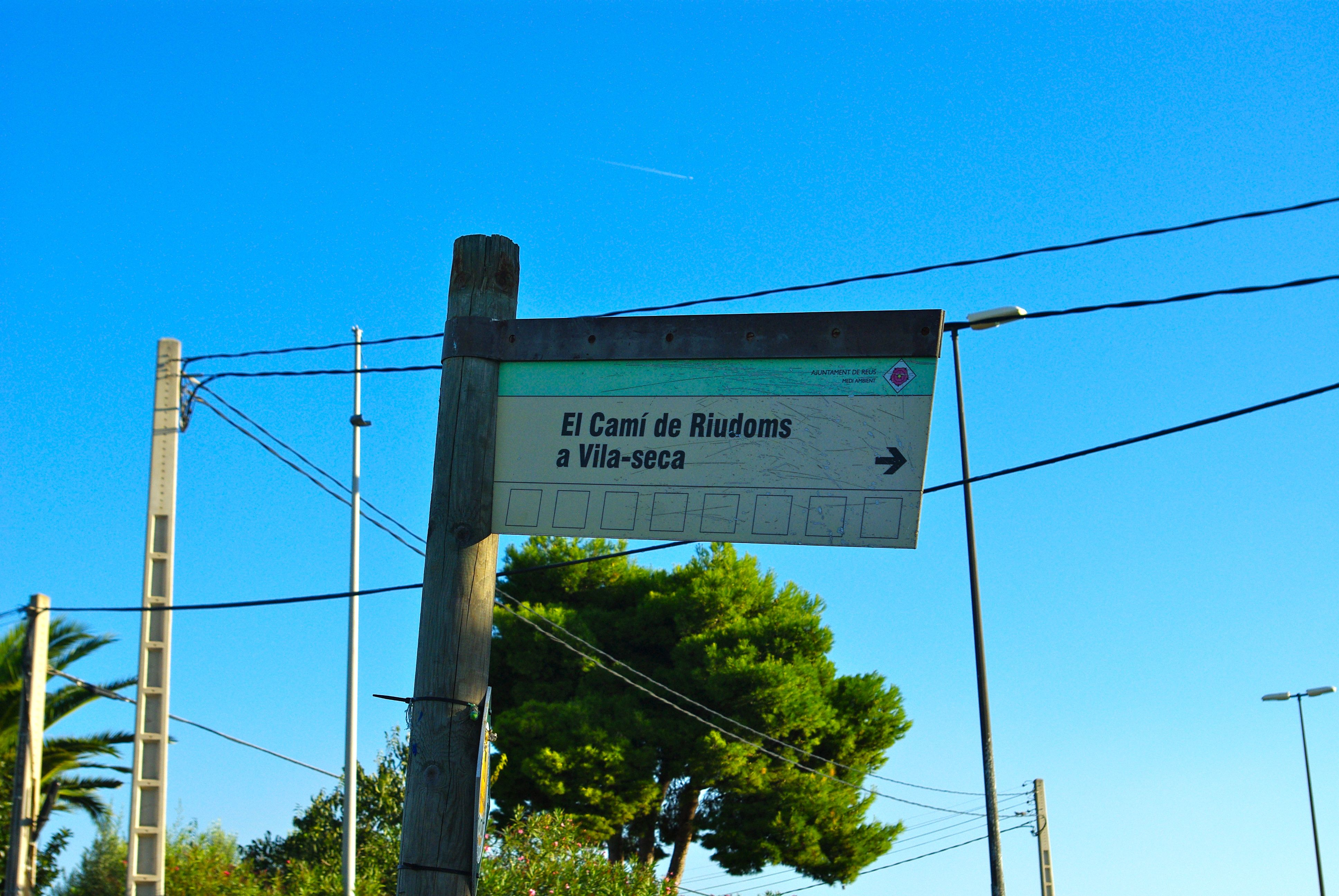 Pal indicador del camí de Riudoms a Vilaseca, a Aigüesverds, al terme de Reus